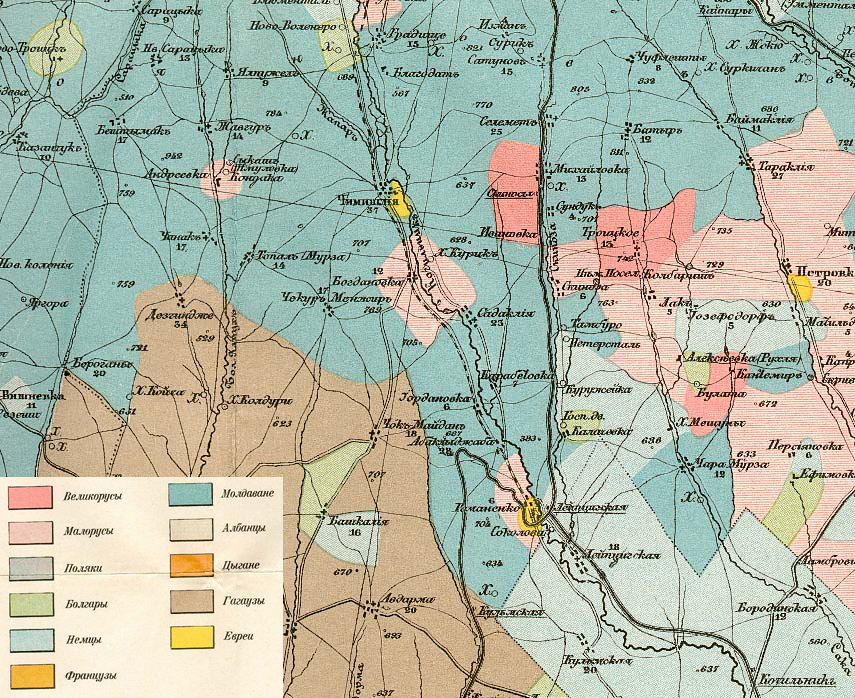 фрагмент «Этнографическая карта в масштабе 10 верст в дюйме»